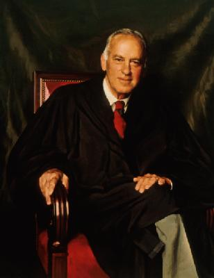 Potter Stewart